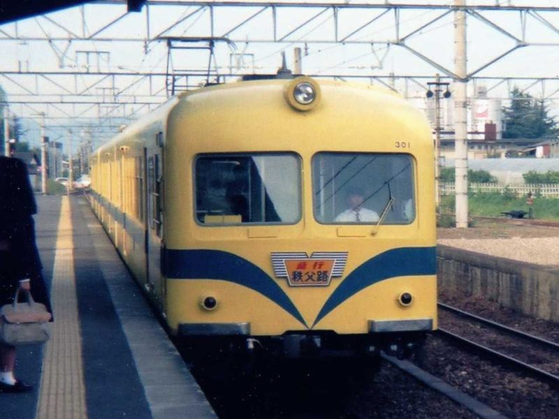 秩父鉄道300形電車 武川駅にて